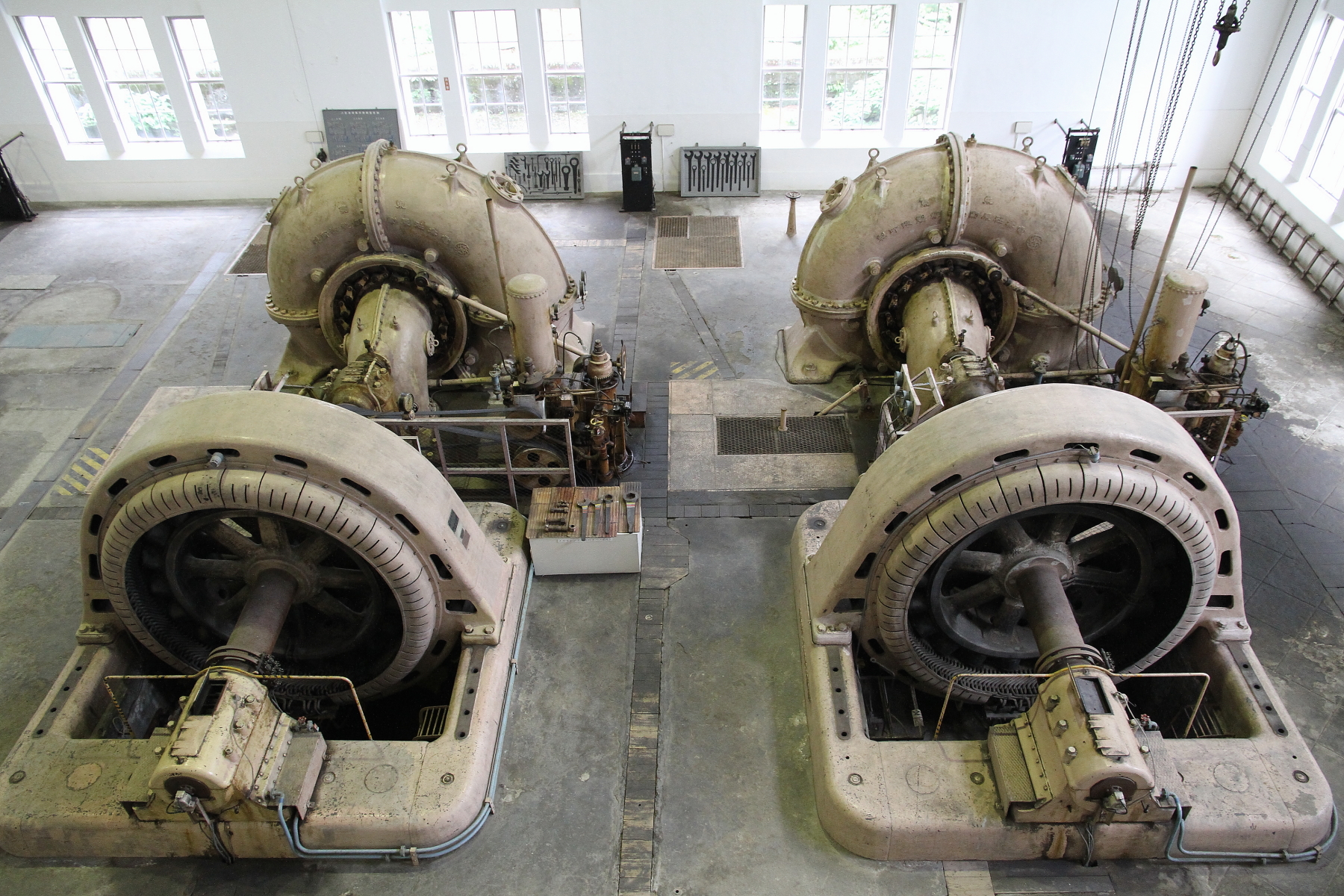 旧八百津発電所資料館に保存されている発電機（手前）とフランシス水車（奥）